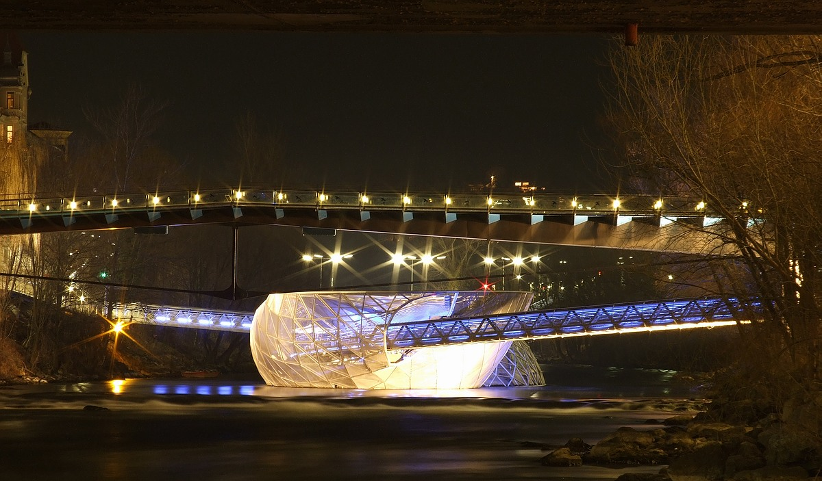 Murinsel bei Nacht vom Ufer der Mur aus betrachtet